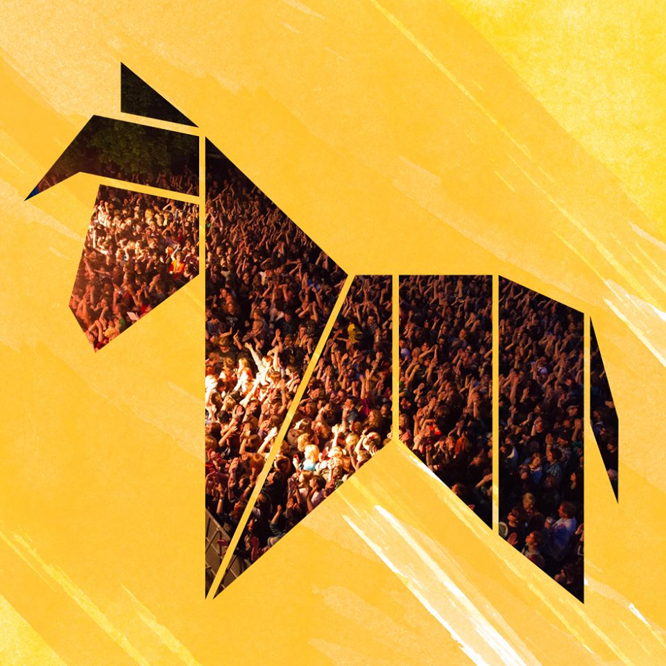 Logo seit 2014